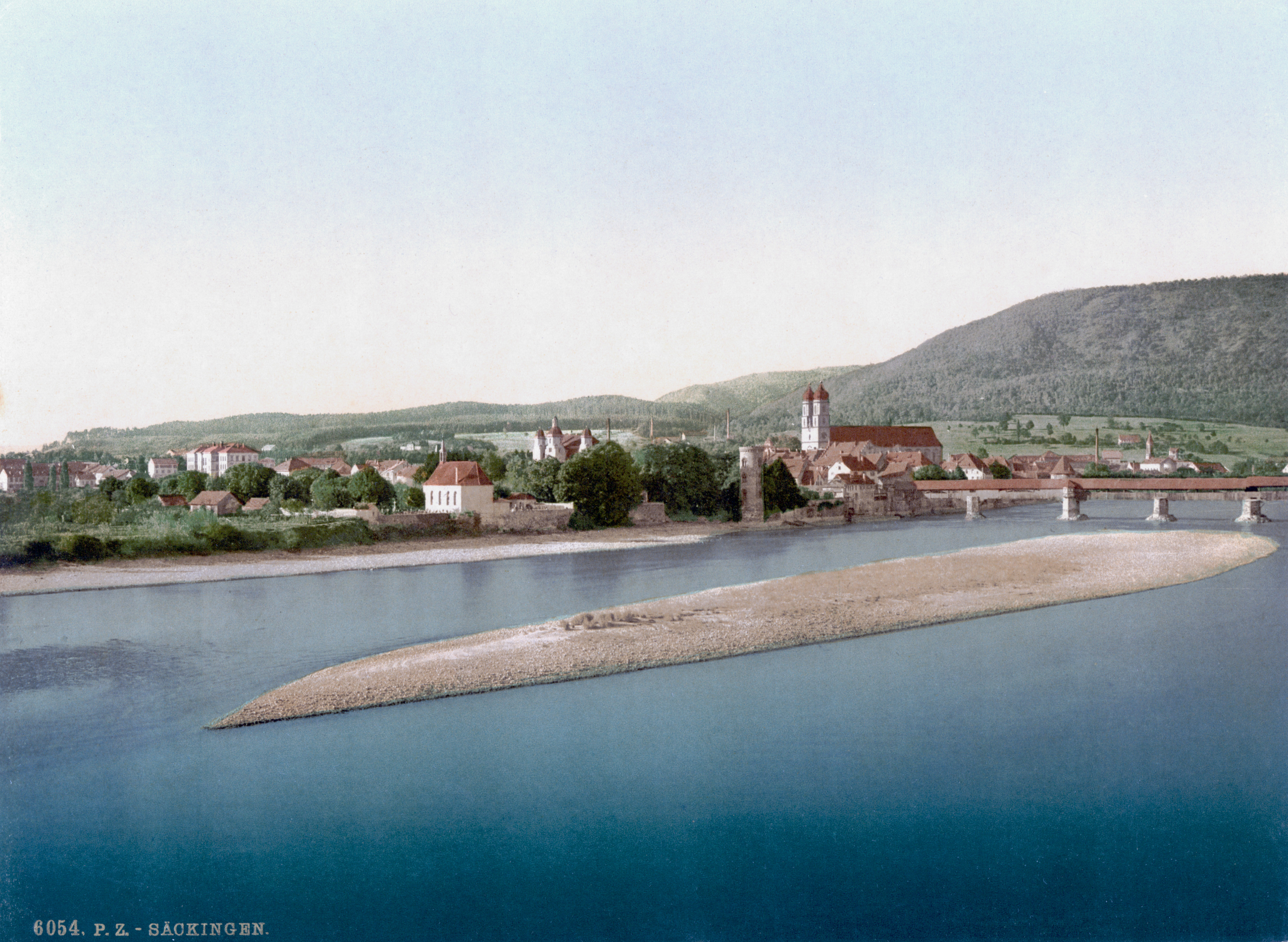 Säckingen